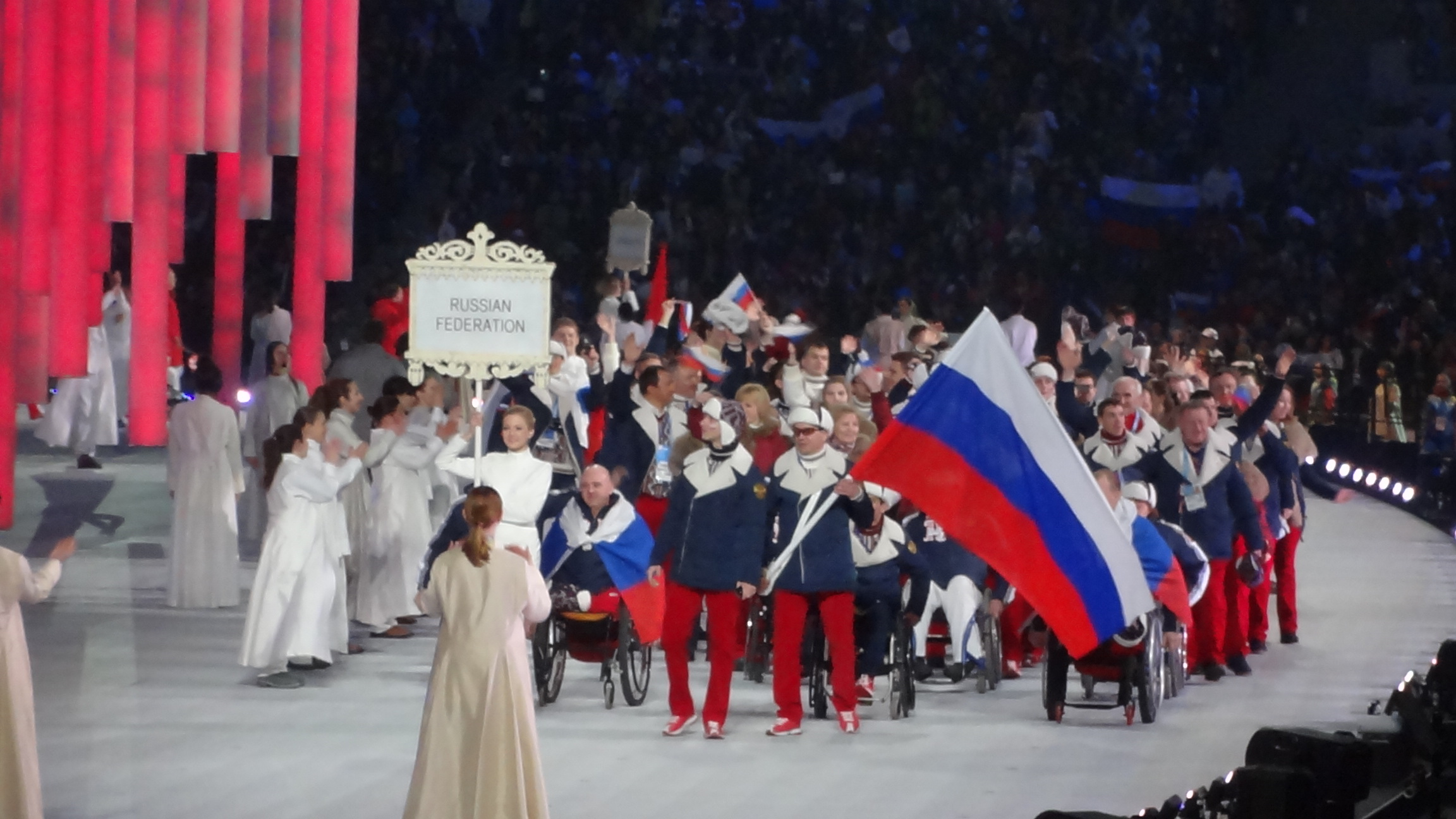 Выход российской сборной на открытии паралимпийских играх под музыку " Гудбай Америка"